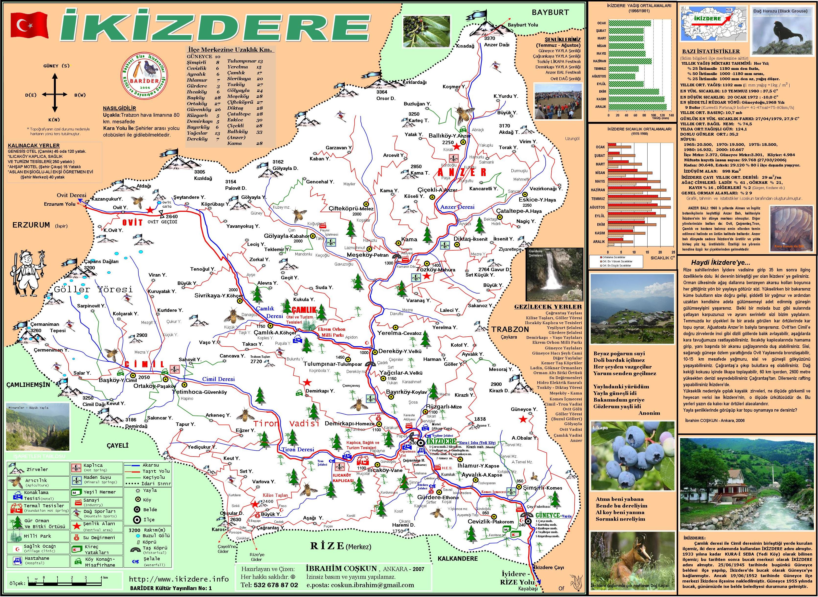 ıkızdere